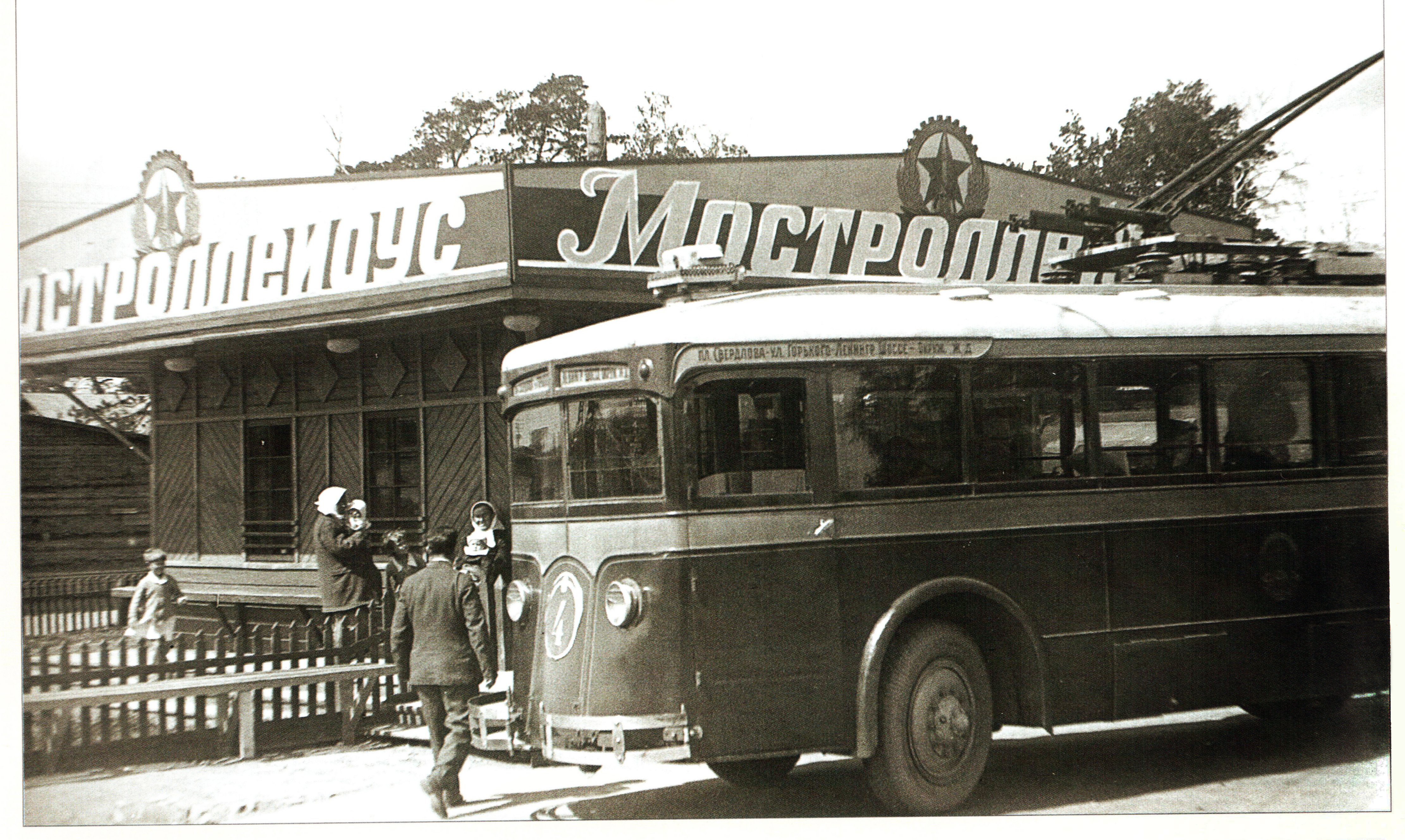 Конечная станция московского троллейбуса в селе Всехсвятском. 1934. Рекламное фото. Стоит троллейбус ЛК-1 номер 4 маршрута "Площадь Свердлова - улица Горького - Ленинградское шоссе - Окружная железная дорога". Оригинальный цвет фото чёрно-белый, сепия - это обработка.